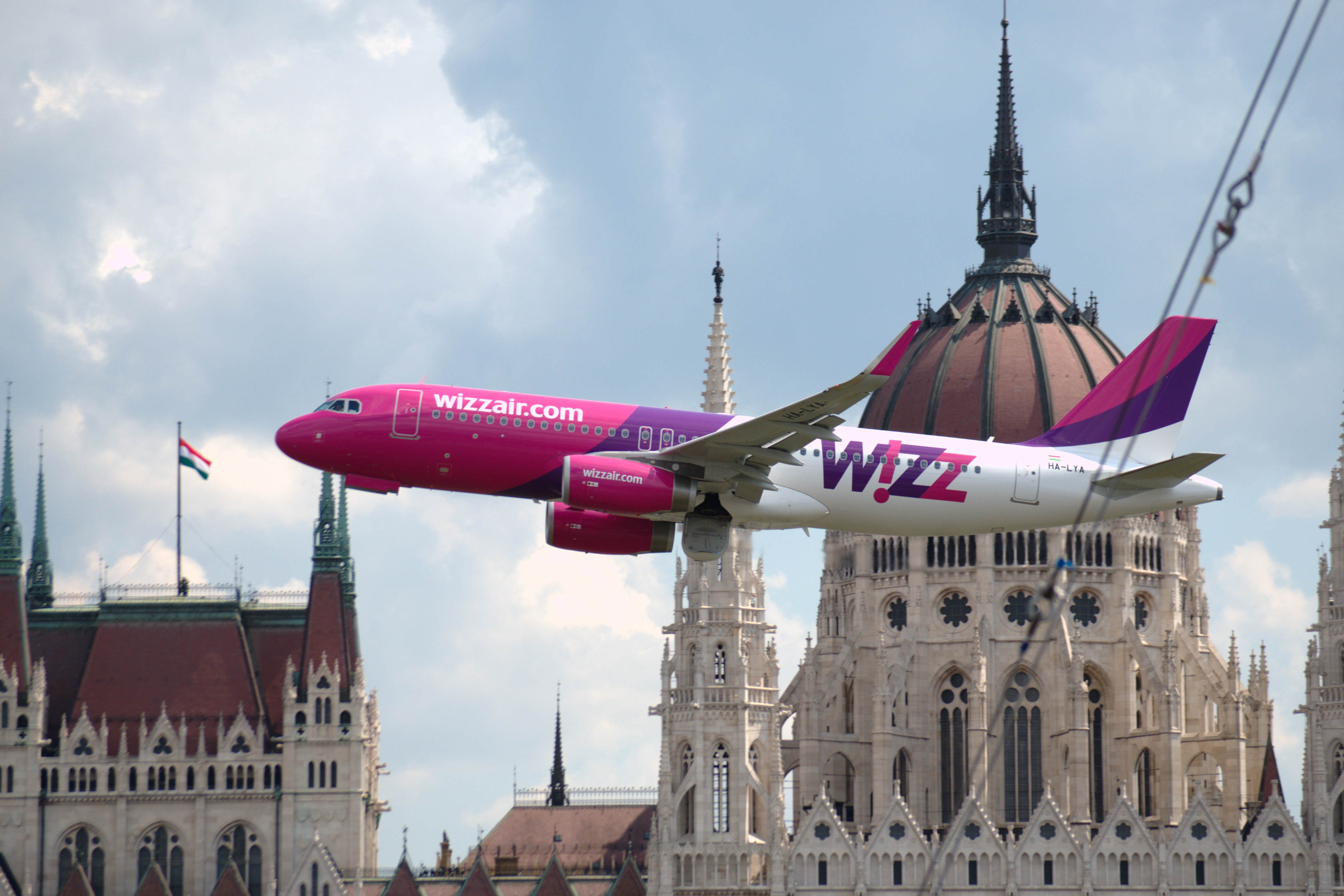 A Wizz Air A320-232 típusú HA-LYA jelű repülőgépe a Budapesten megrendezett Nagy Futam II rendezvényen